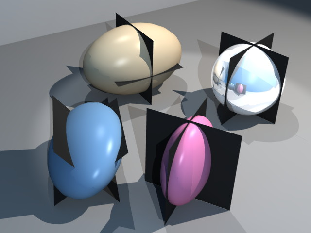 Een viertal ellipsoiden in beeld: een ongelijke ellipsoïde (blauw), een prolate sferoïde (geel), een oblate sferoïde (rood) en een bol (metallic). Gemaakt met Blender en YafRay.